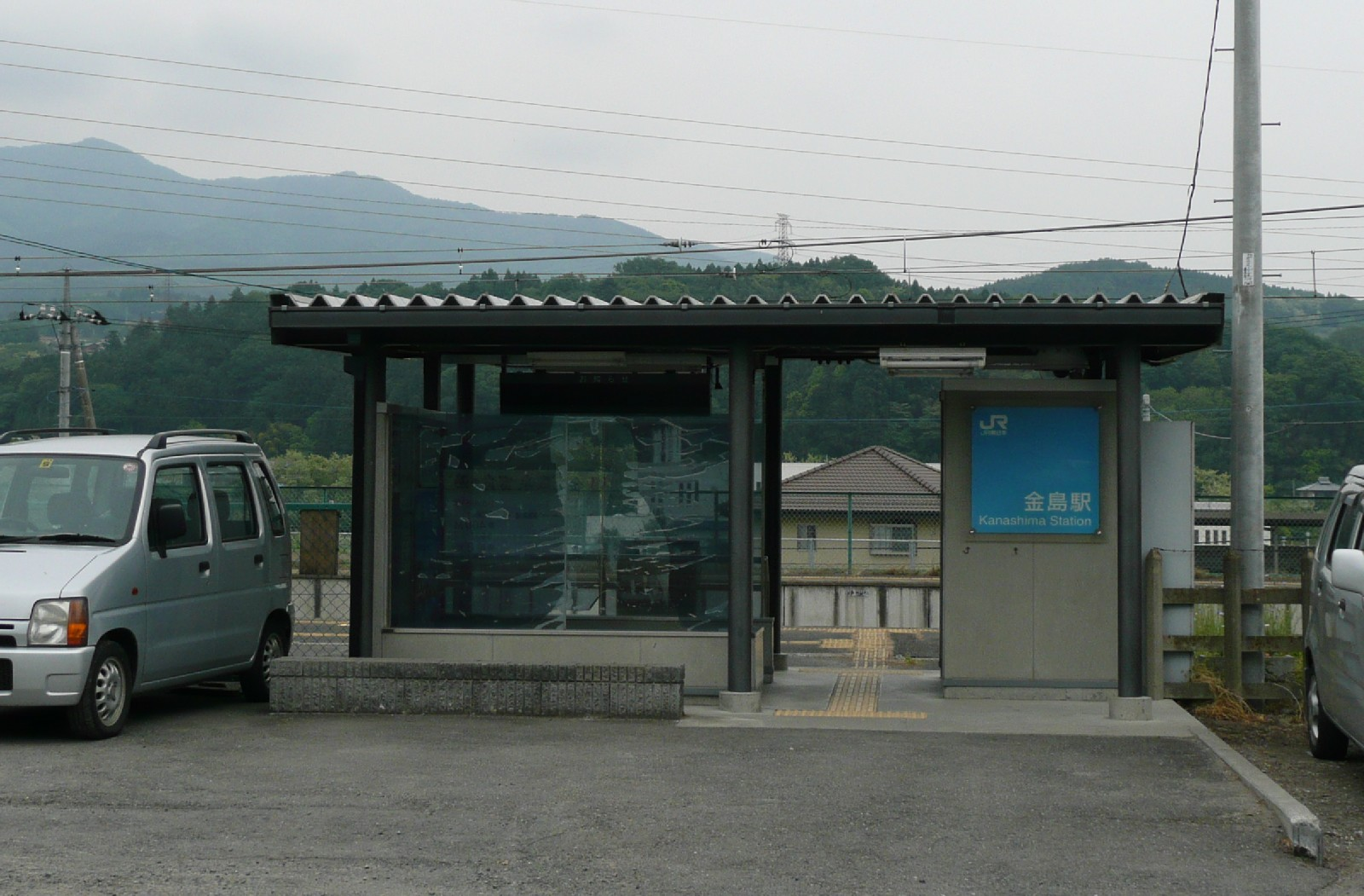 金島駅